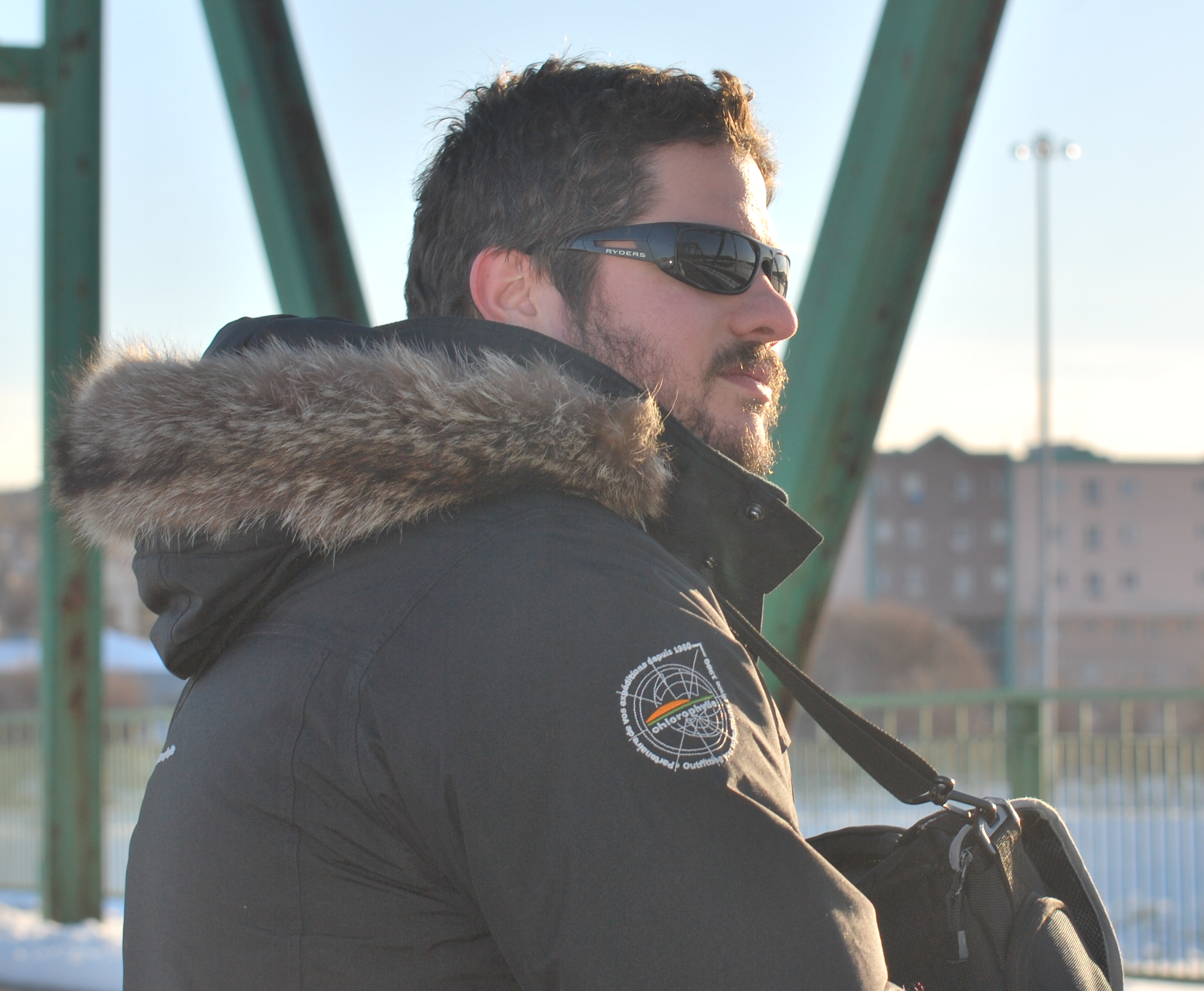 Exemple de manteau d'hiver canadien créé par l'entreprise Chlorophylle.